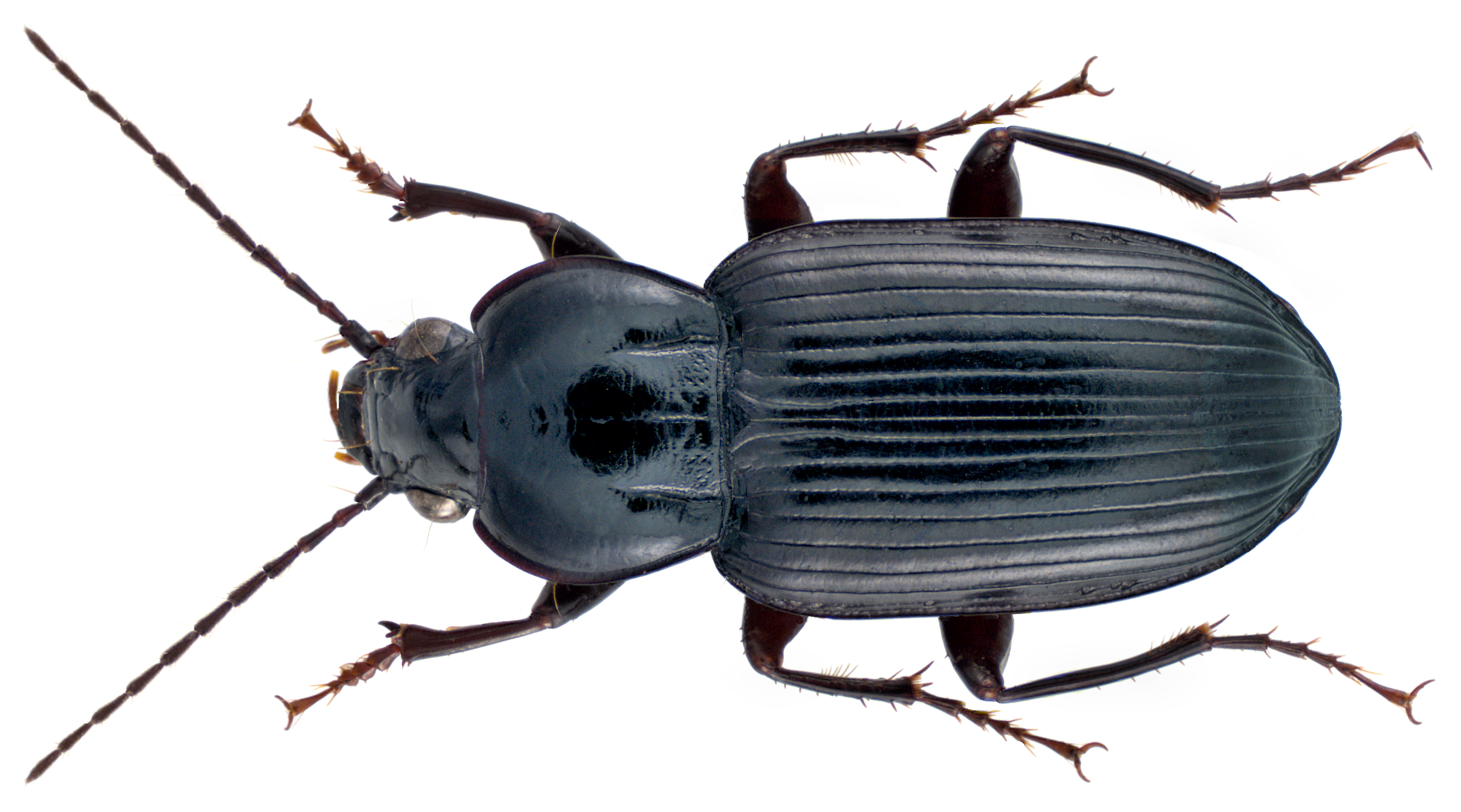 Family: Carabidae Size: 11,2 mm Location: Senegal, M`Bour, environment Club Aldiana leg. U.Schmidt, 8.-20.X.1992; det. M.Baehr, 2012 Photo: U.Schmidt, 2014